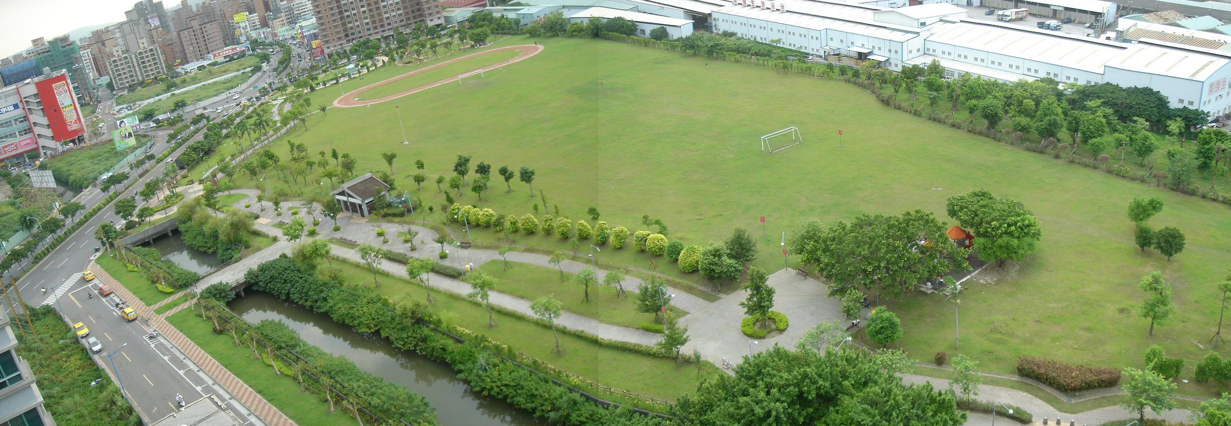 台北縣三重市集賢路集賢環保公園鳥瞰